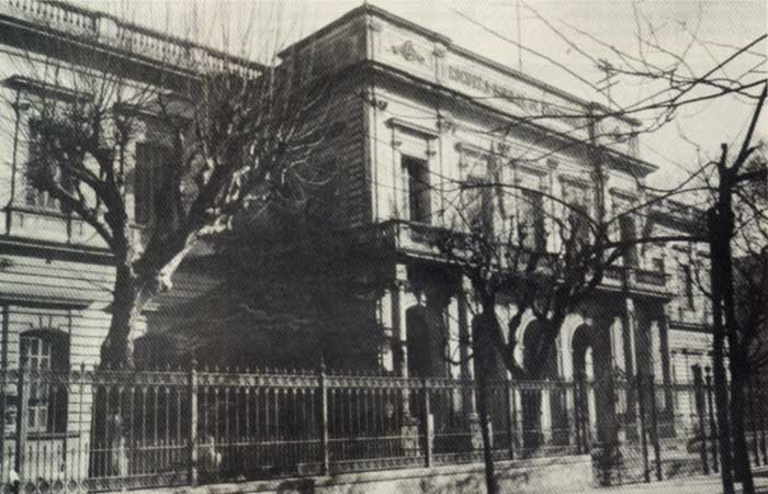 La Escuela Normal de Profesores "Mariano Acosta" en la calle General Urquiza de Buenos Aires. Edificio del año 1889, arquitecto Francesco Tamburini.